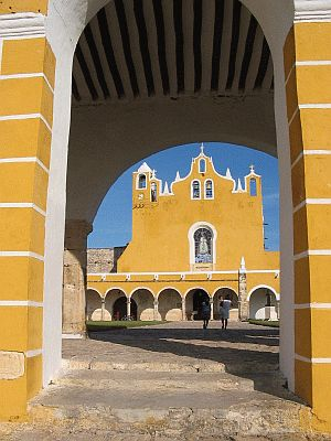 Izamal - Mexique - Couvent Saint-Antoine de Padoue Photo personnelle (Wishmaster) prise en octobre 2003, Mexique Sous licence GFDL Wishmaster octobre 2003